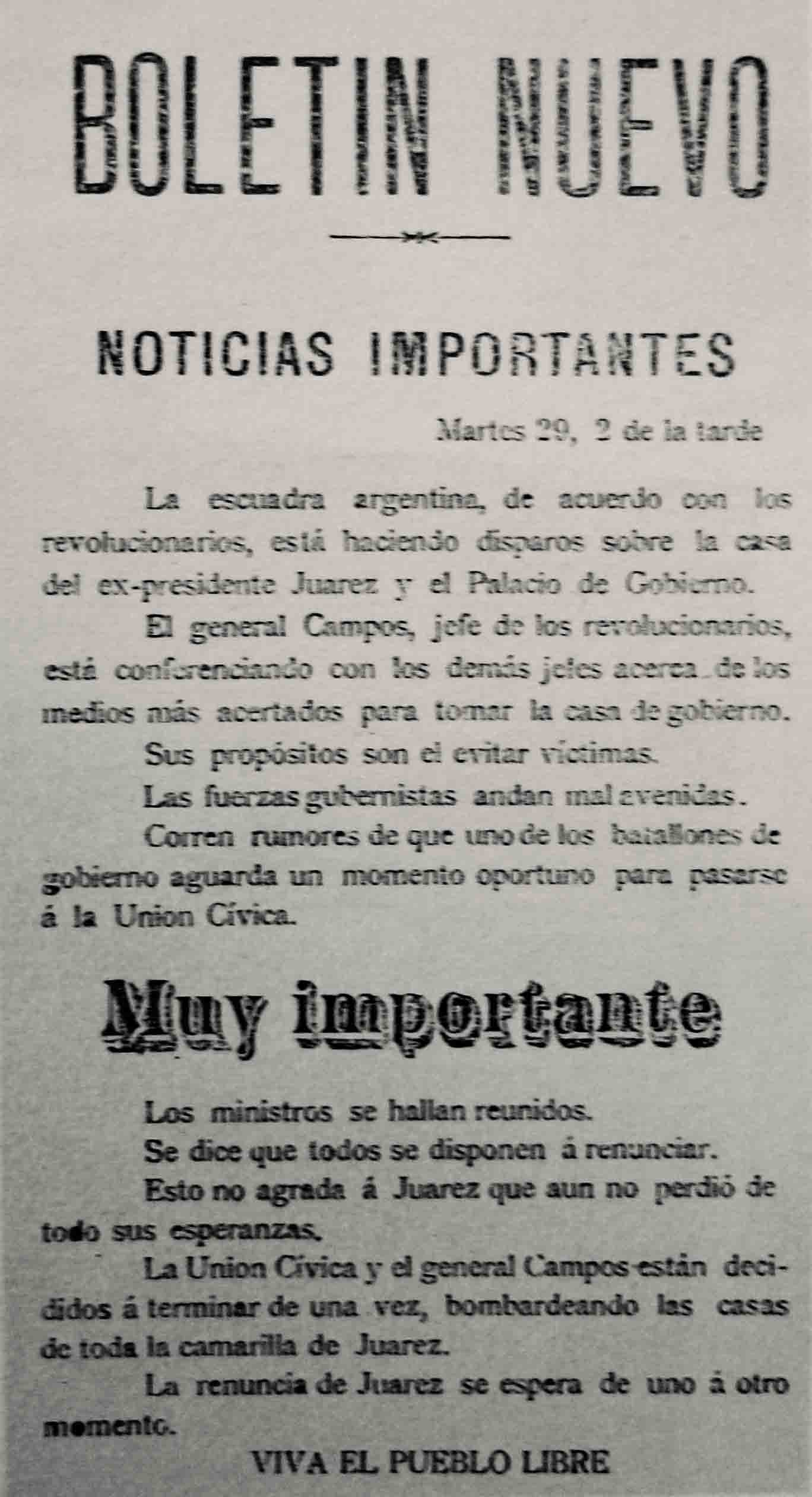 Boletín de la Revolución del Parque.